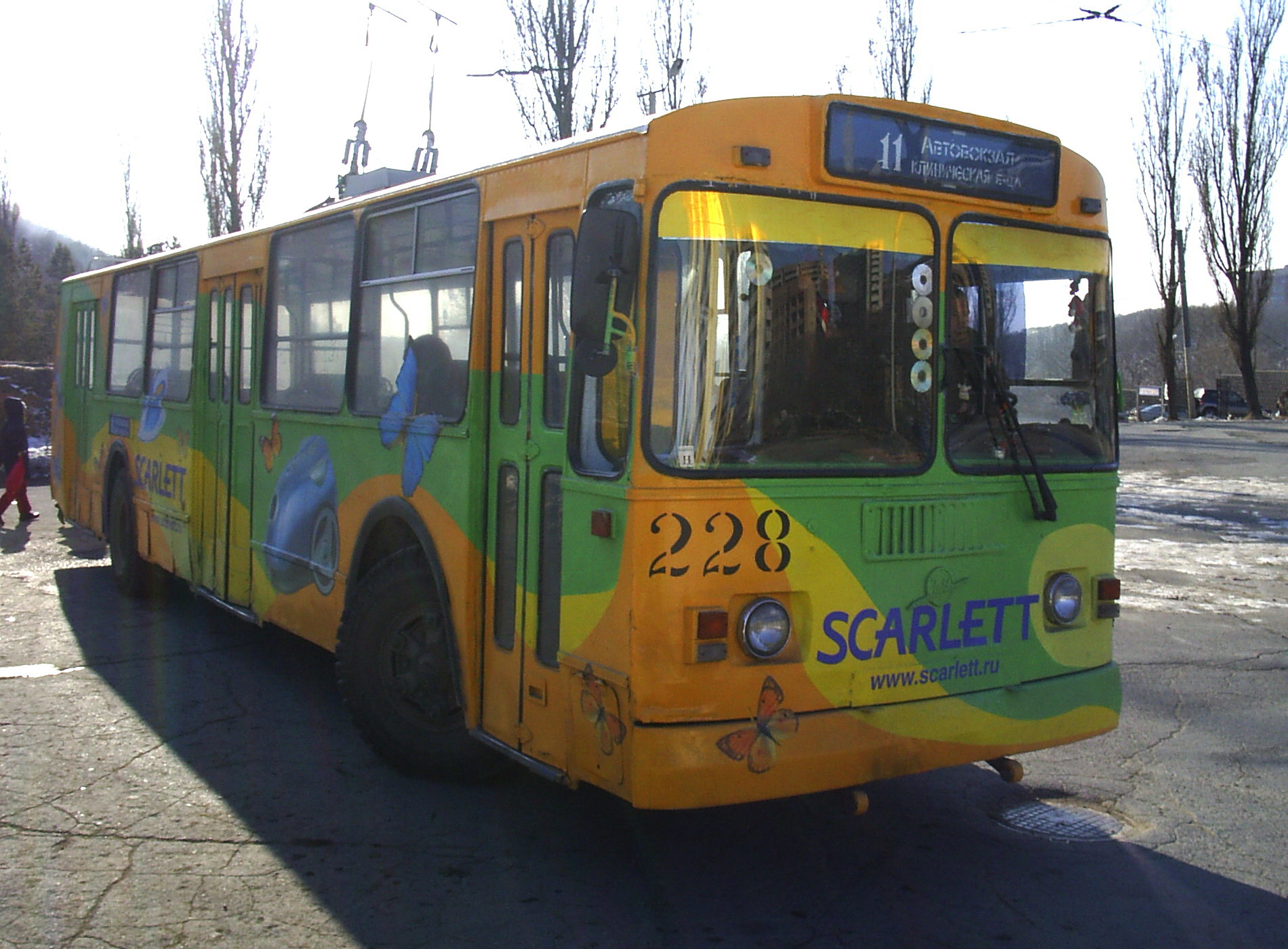 Троллейбус ЗиУ-6 на конечной остановке Клиническая Больница, Владивосток